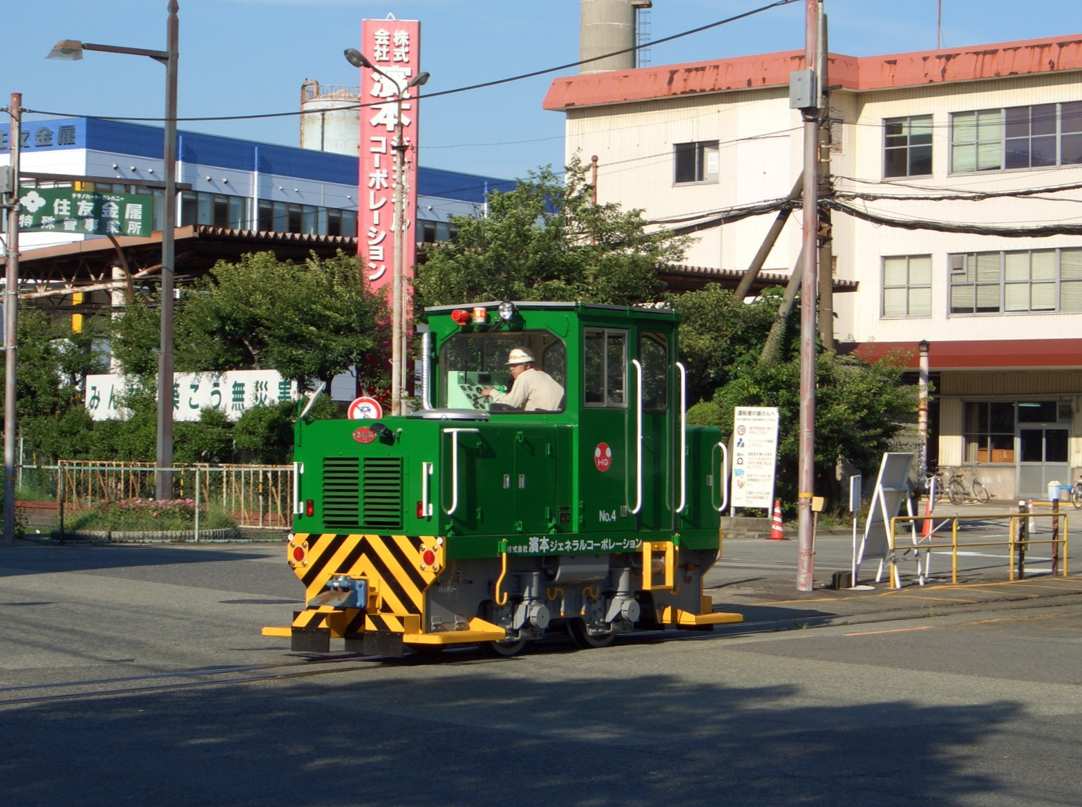 濱本ジェネラルコーポレーションの機関車。 兵庫県尼崎市東高洲町。